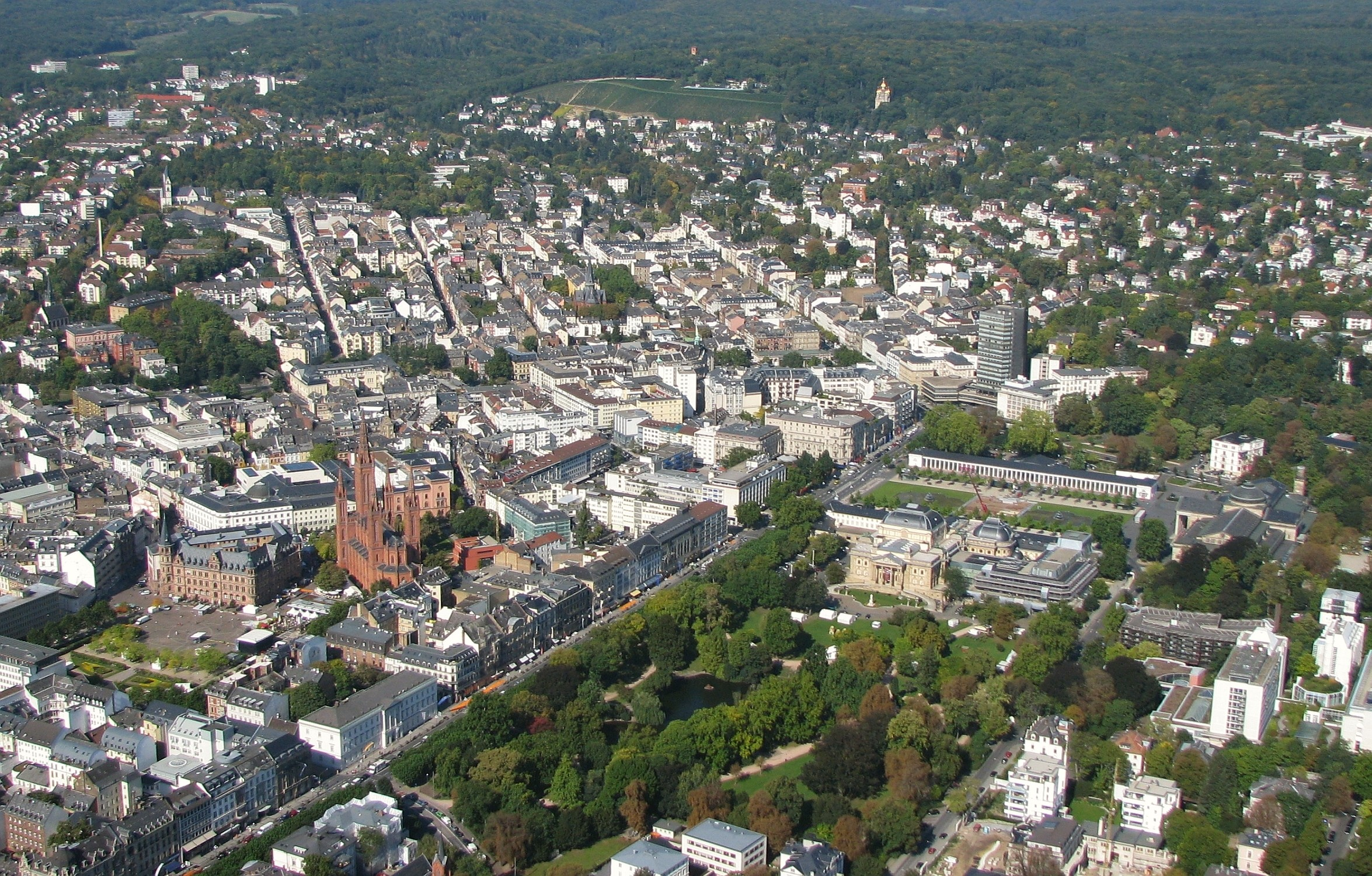 Luftbild Landeshauptstadt Wiesbaden, oben: Neroberg, Opelbad, Griechische Kapelle, Mitte von links: Dern'sches Gelände mit Rathaus, Landtag Hessen nach Umbau, Marktkirche, Wilhelmstraße, Kurhaus - Foto Wolfgang Pehlemann Wiesbaden IMG_0182.jpg